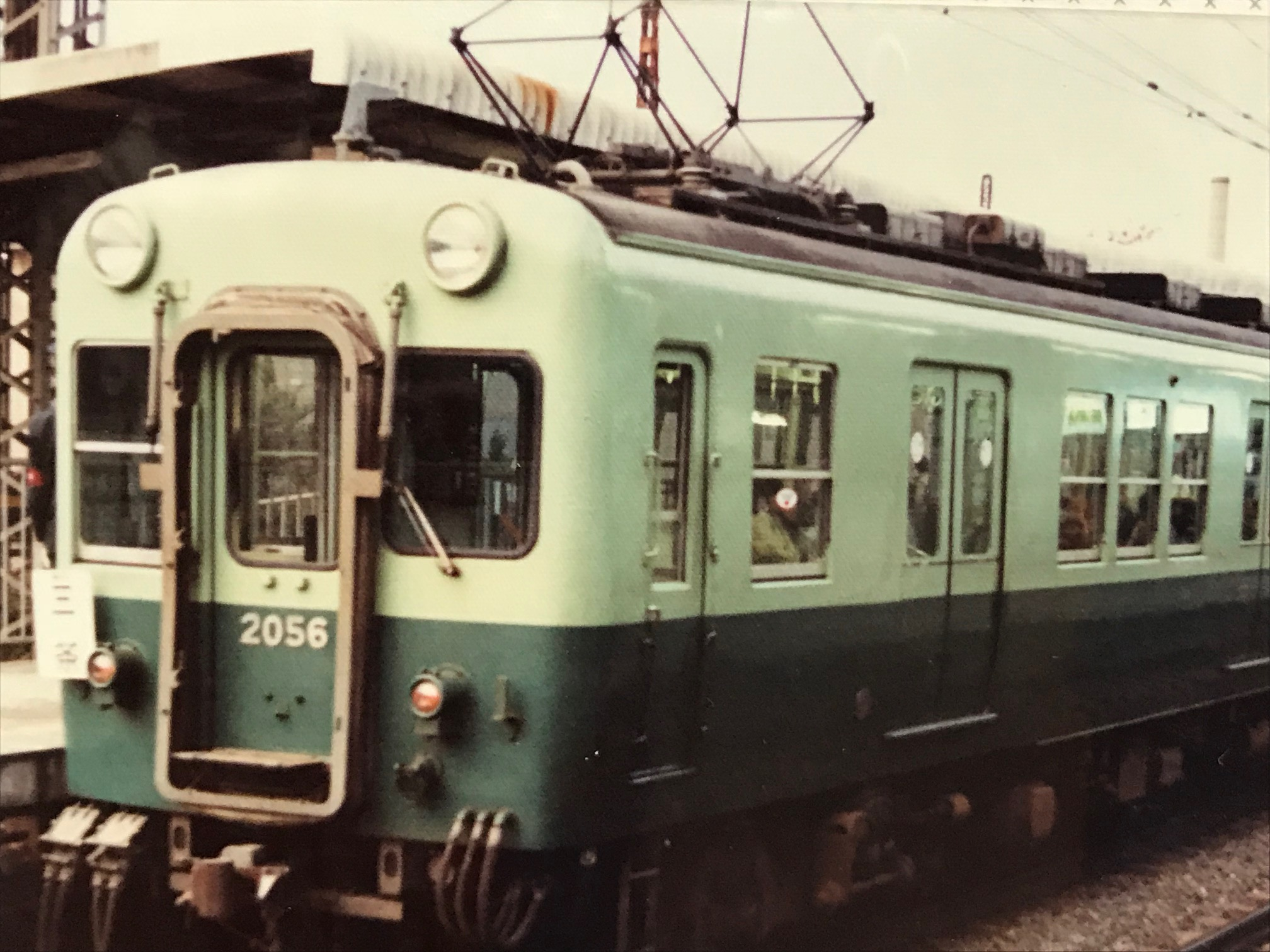 京阪2000系晩年